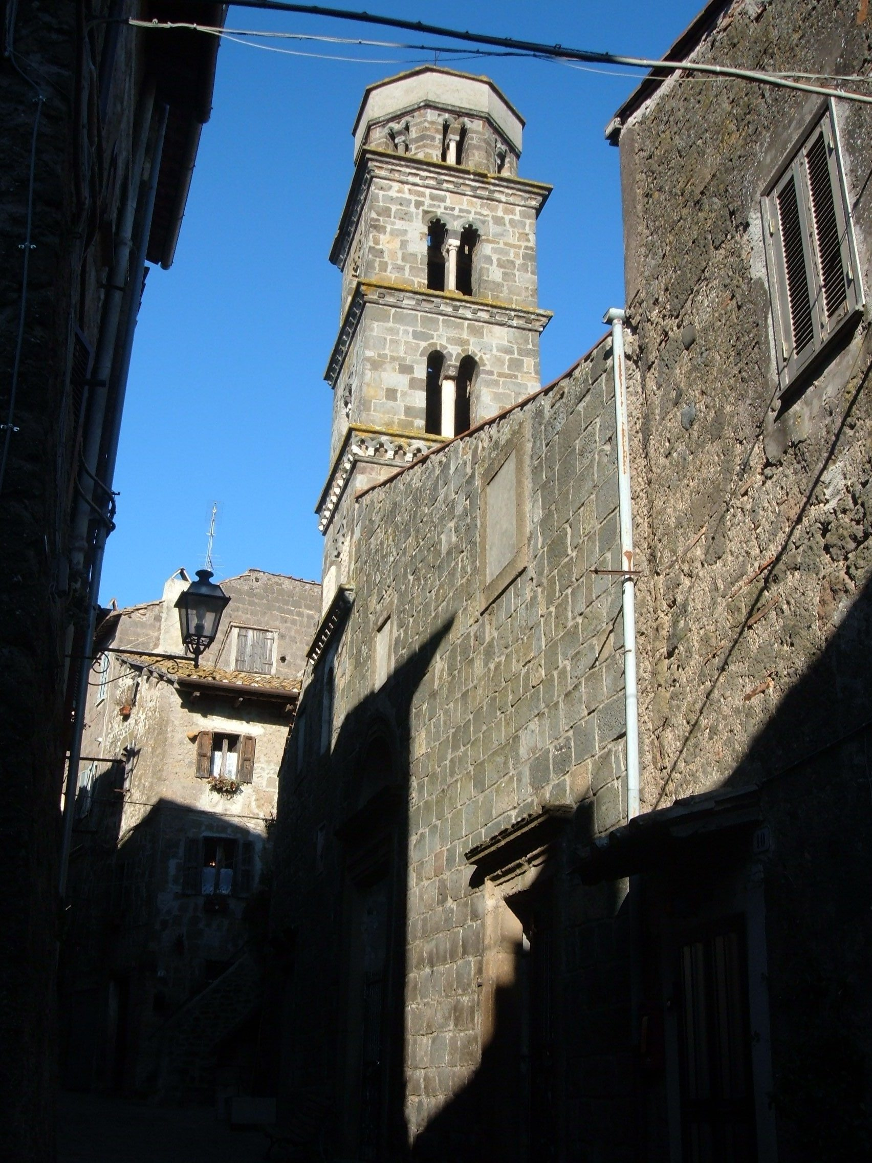 Ronciglione_-_Ex chiesa di Sant'Andrea